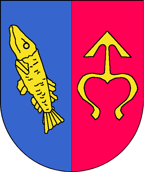 Herb arcybiskupa Damiana Zimonia, Katowice, Polska